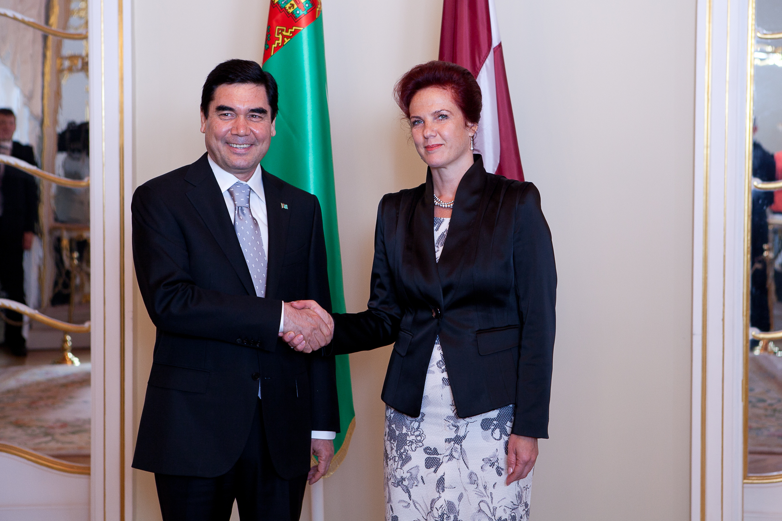 2012.gada 11.septembris. Saeimas priekšsēdētāja Solvita Āboltiņa tiekas ar Turkmenistānas prezidentu Gurbanguli Berdimuhamedovu. Foto: Ernests Dinka, Saeimas Kanceleja